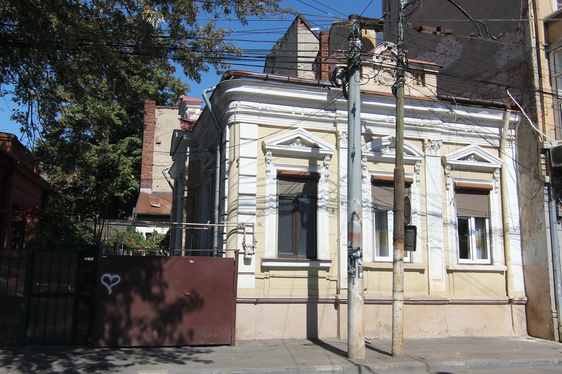 Casă pe Calea Călărașilor